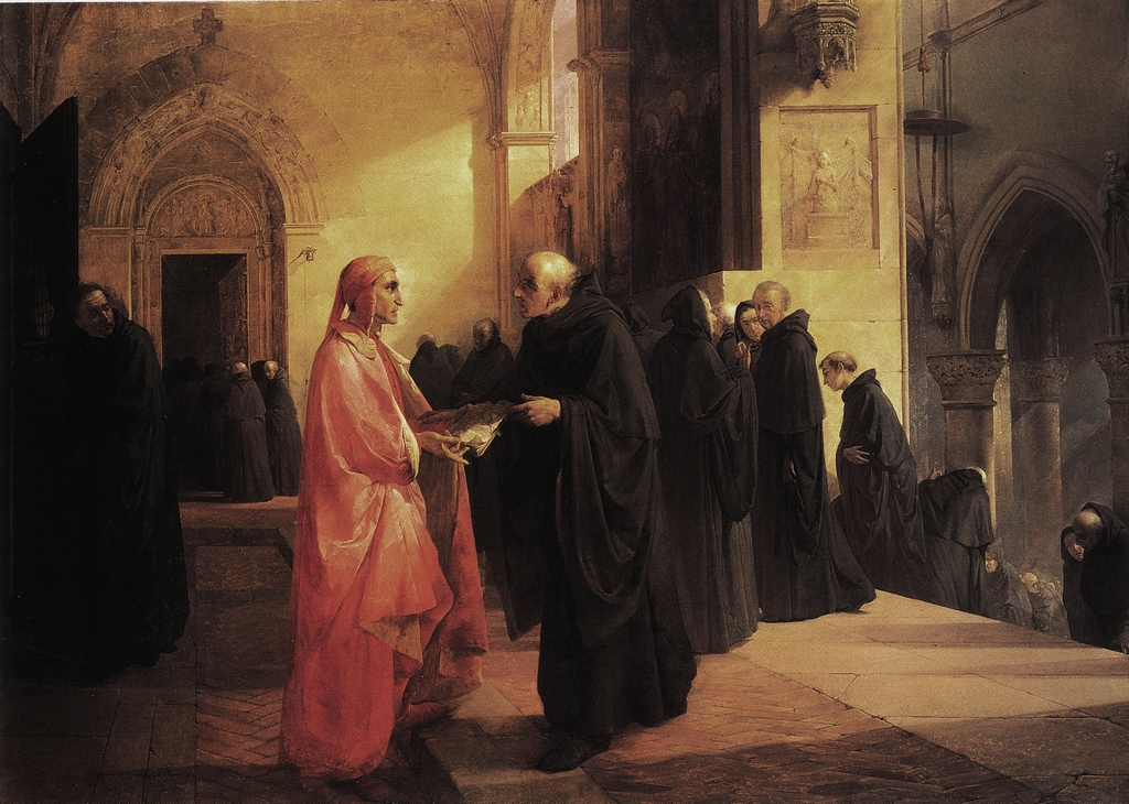 Dante Alighieri nel convento dei monaci agostiniani incontra Frate Ilario al quale dona parte del testo della Divina Commedia.